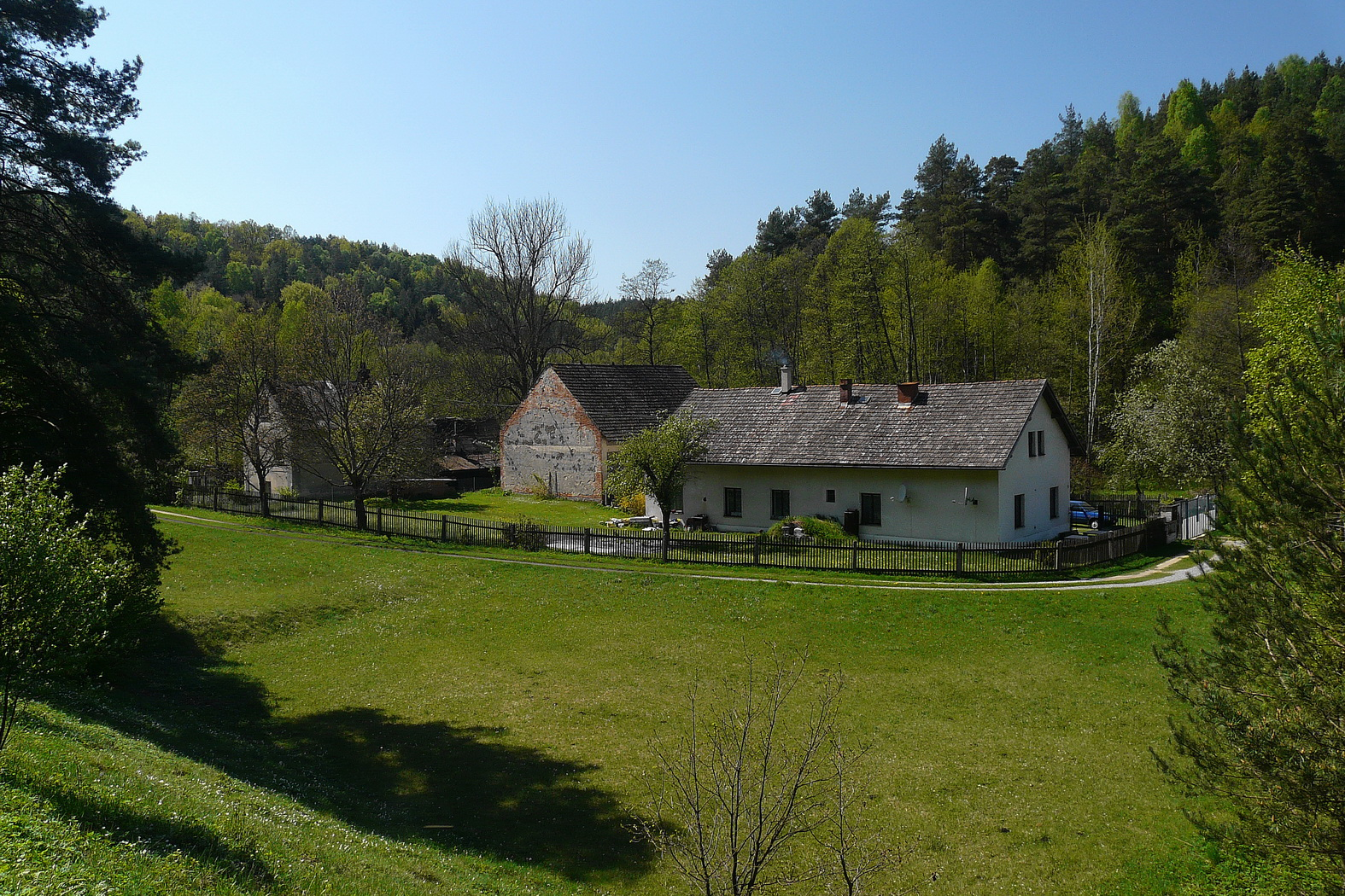 Malý Rečkov